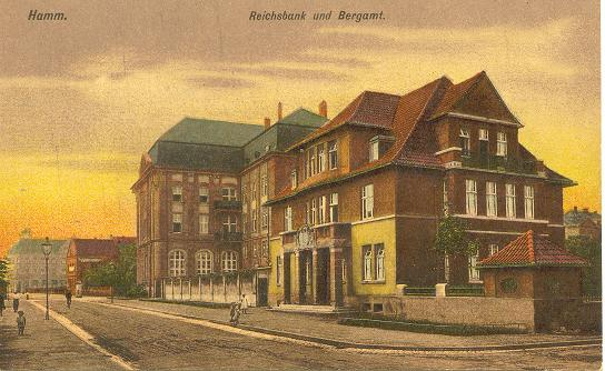 Reichsbank und Bergamt in Goethestraße in Hamm, ca.1918